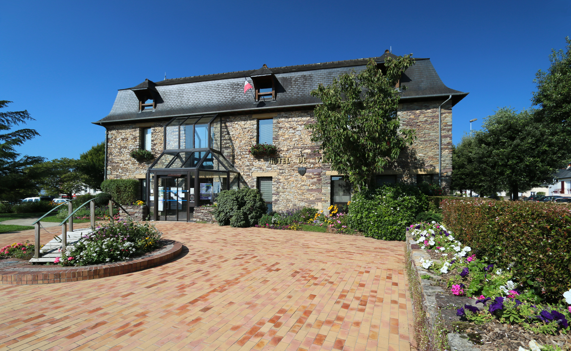 Mairie de Laillé